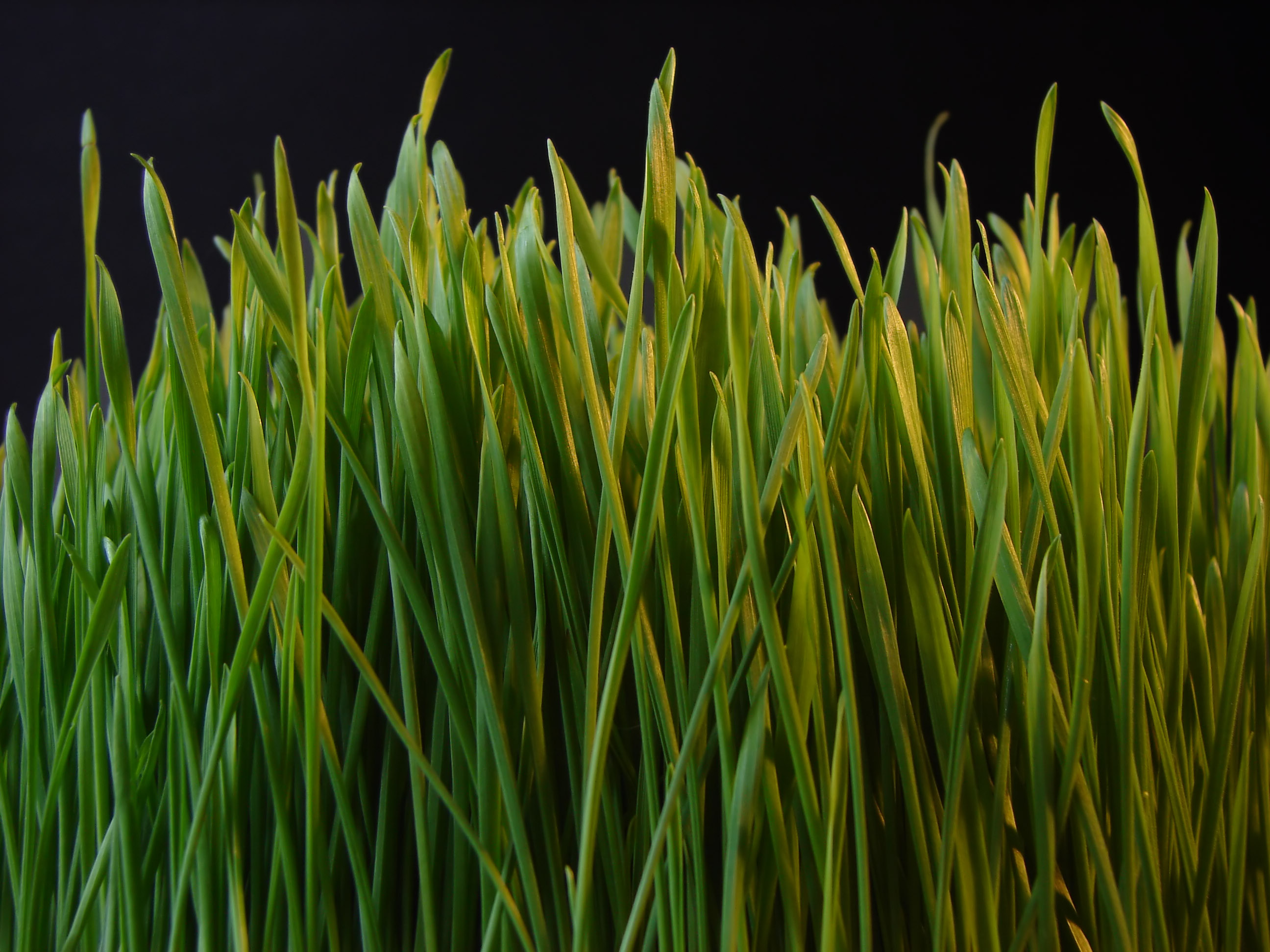 Grass